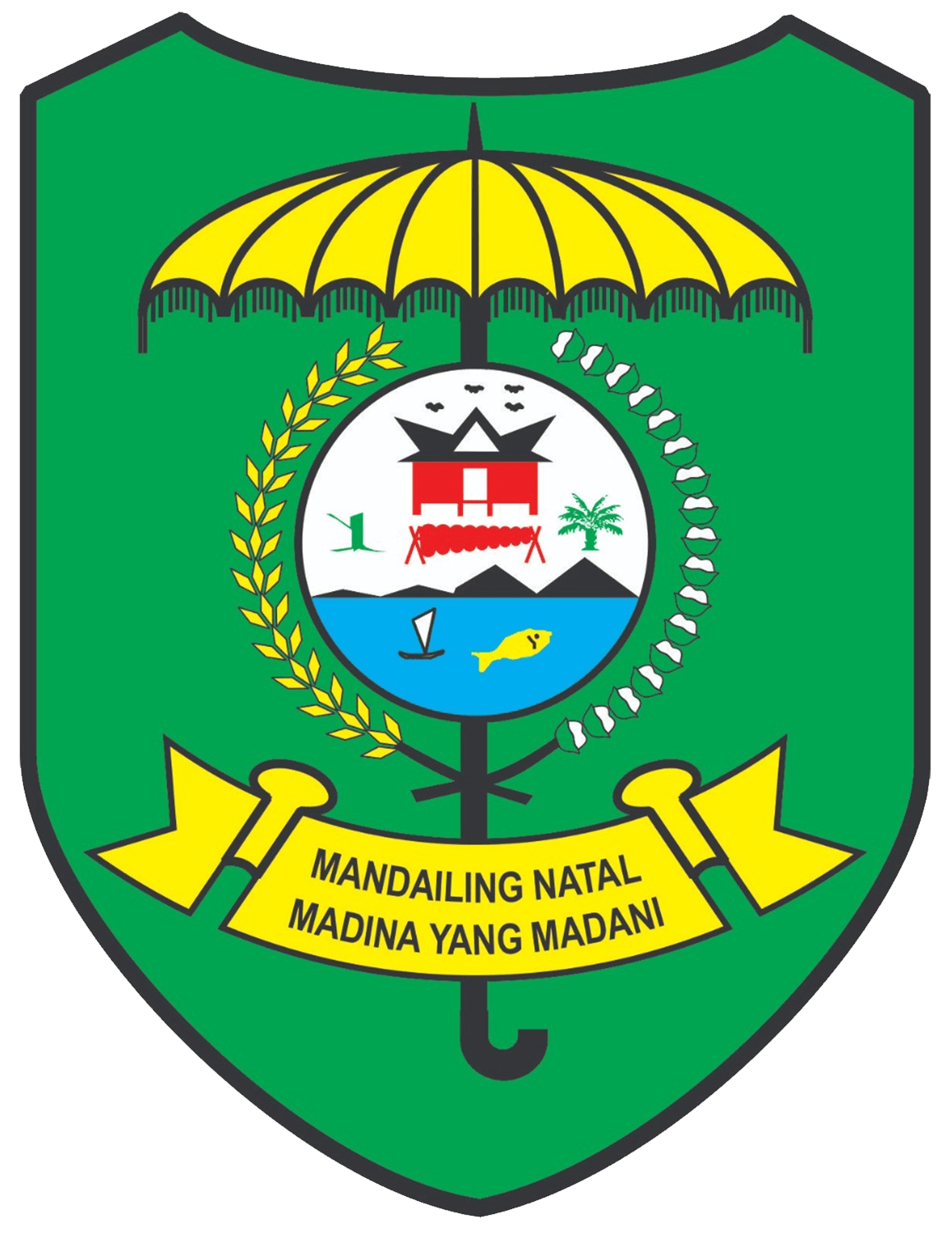 Lambang daerah Mandailing Natal